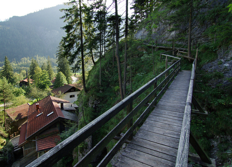 Brücke über den Wasserfall am Ortsrand von Bayrischzell